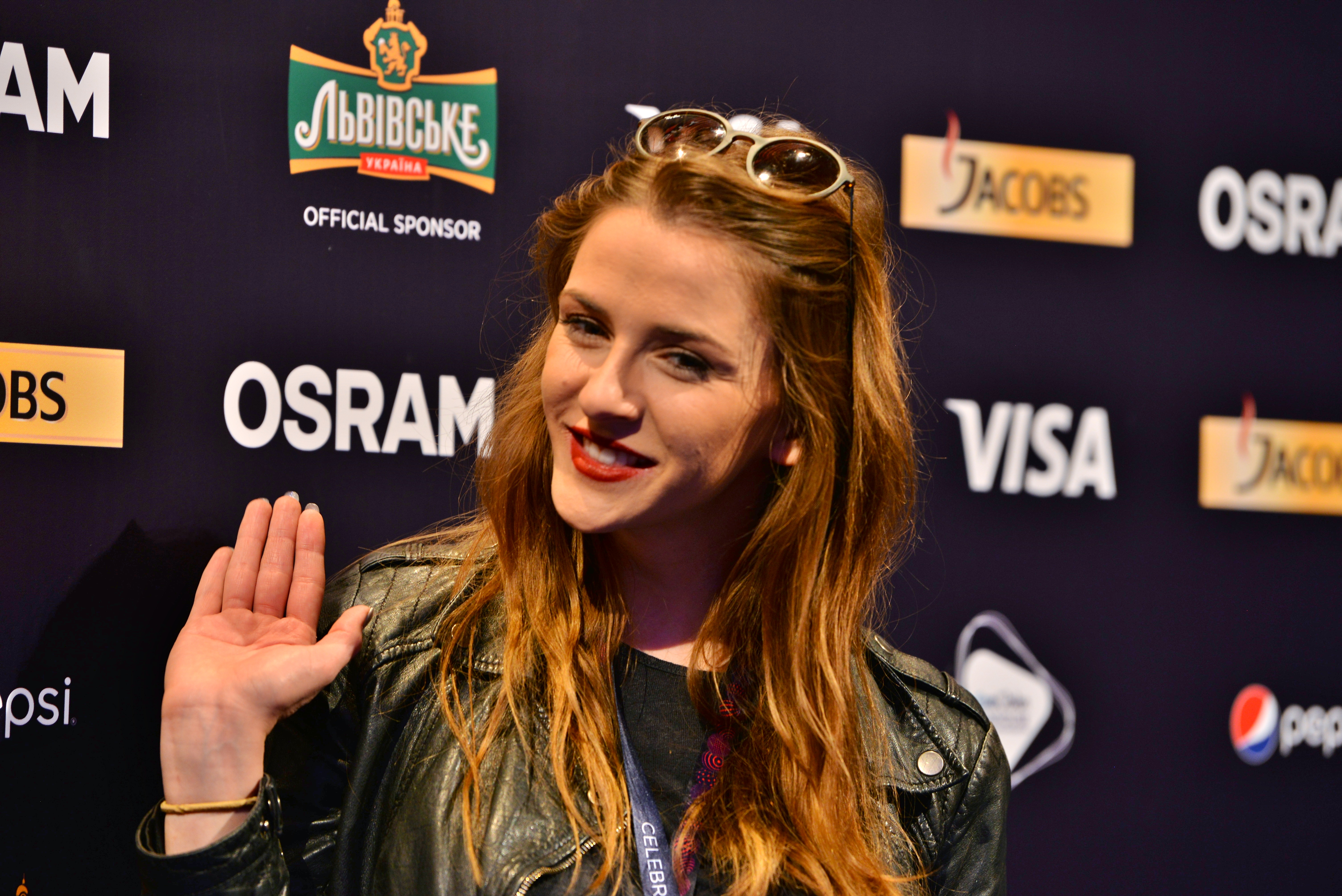 Македонська співачка Яна Бурческа на пісенному конкурсі Євробачення 2017 у Києві